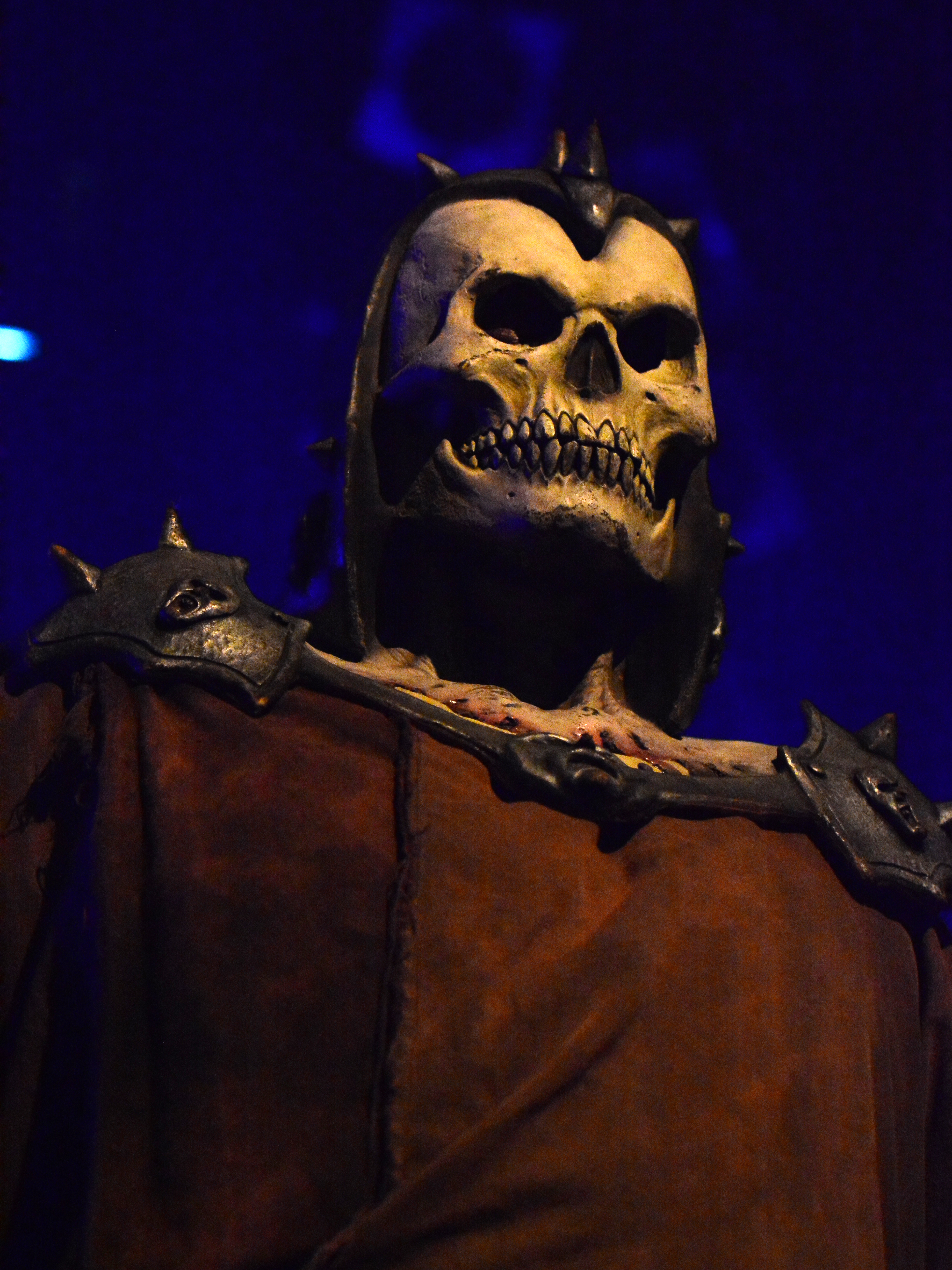 Grailnights bei der Wacken Roadshow 2014 im Hamburger Knust